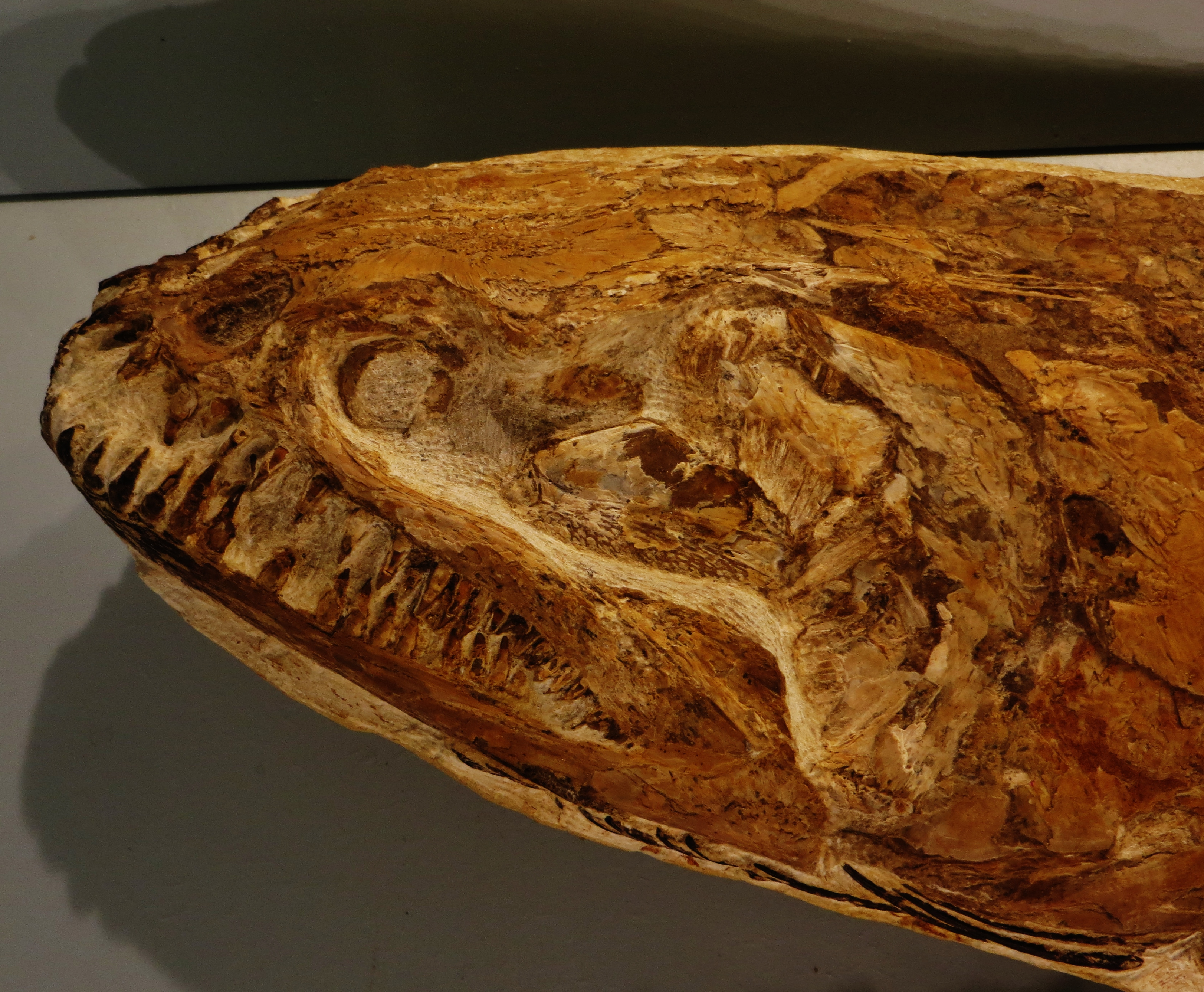 Fossil - Took The picture at Royal Belgian Institute of Natural Sciences, Brussels